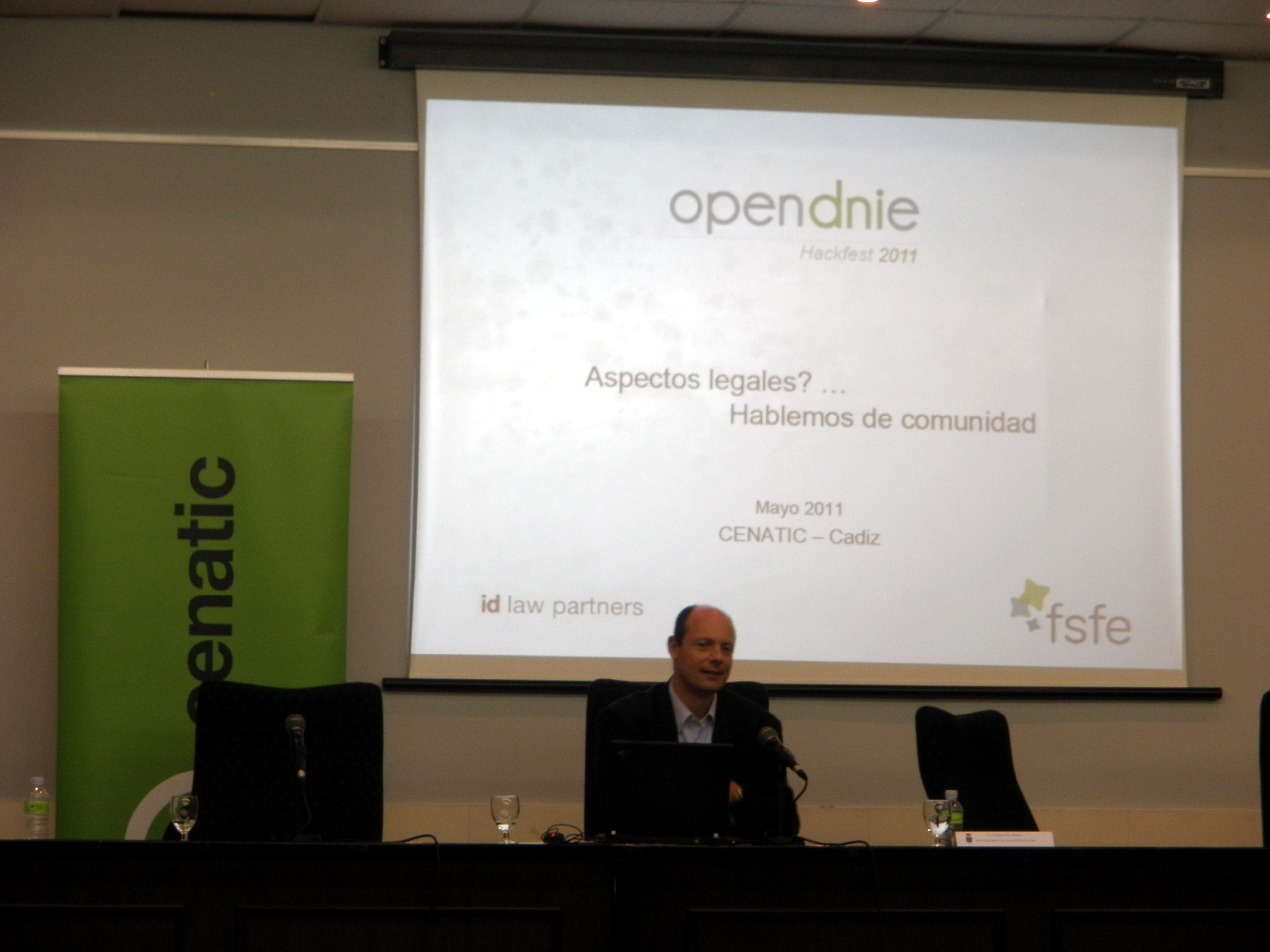 OpenDNIe Hackfest Cádiz 2011